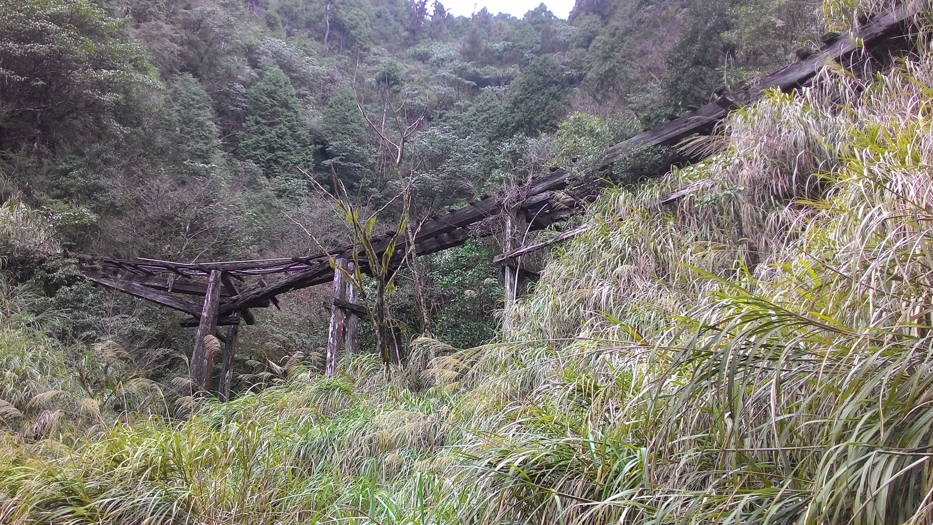 太平山莊公廁後方的鐵路遺跡